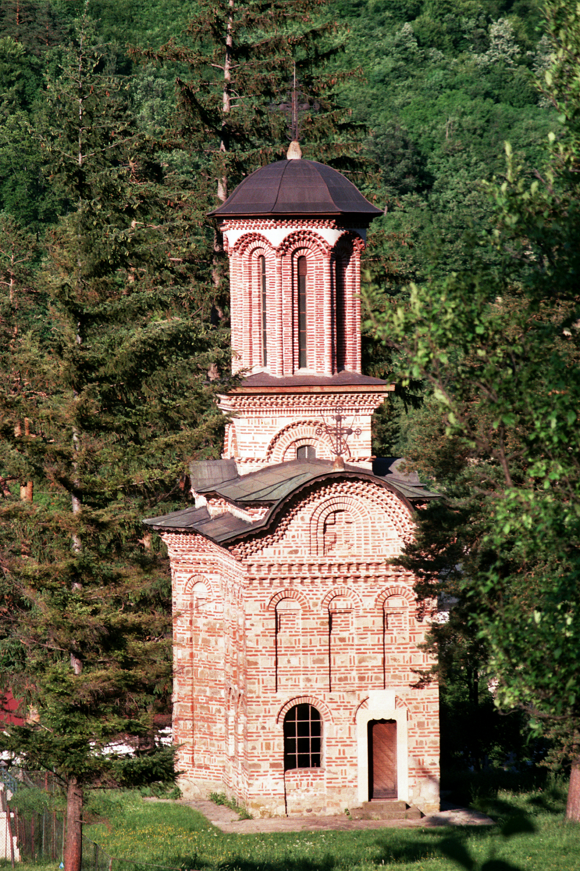 Biserica-bolniță " Sf. Apostoli" de la mânăstirea Cozia 05